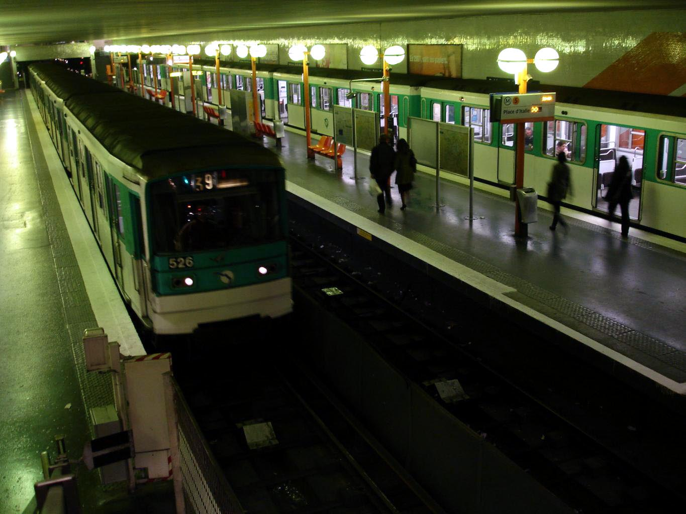 Métro de Paris - ligne 5 - Station Bobigny - Pablo Picasso (France) - Mars 2007 Photo personnelle de clicsouris